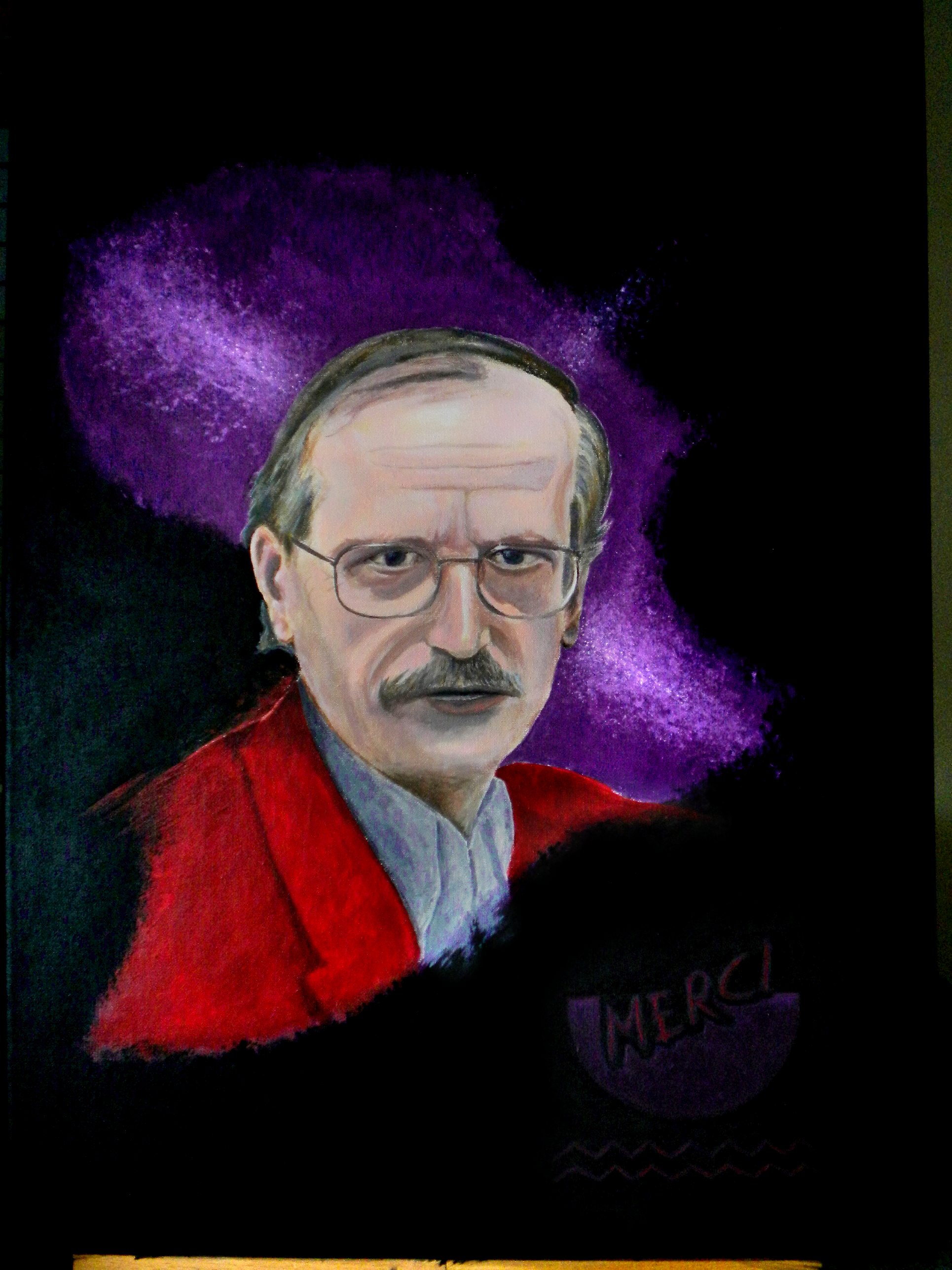 Hommage aux efforts d’intégrité de François-Xavier Verschave.